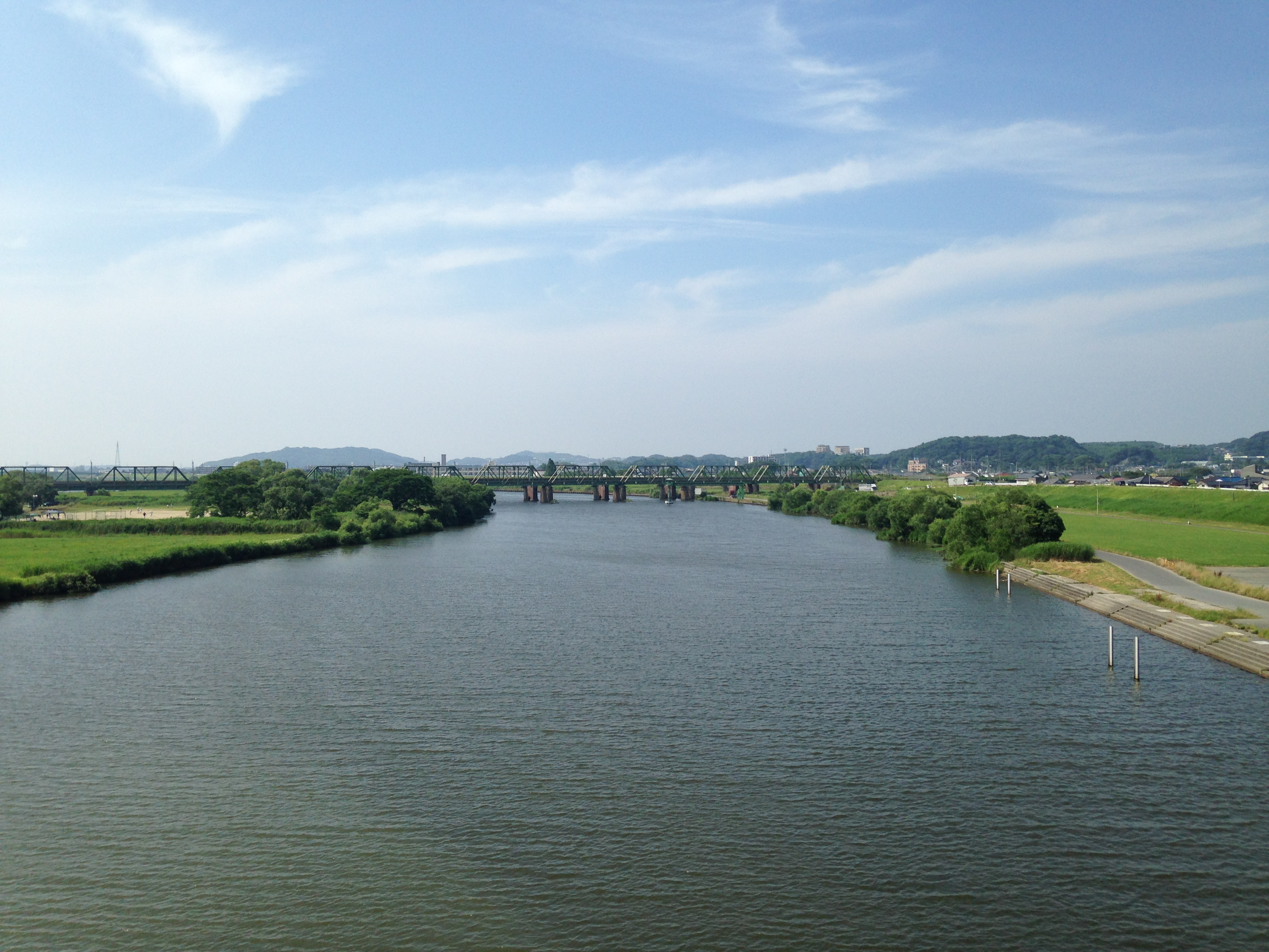 遠賀橋より望む遠賀川(下流側)